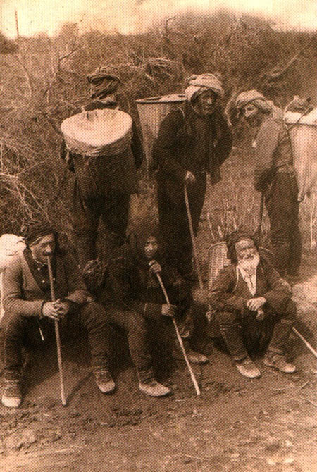 აჭარელი გლეხები ბაზარში მიდიან. უცნობი ავტორი. დაახ. 1900-იანი წლები.